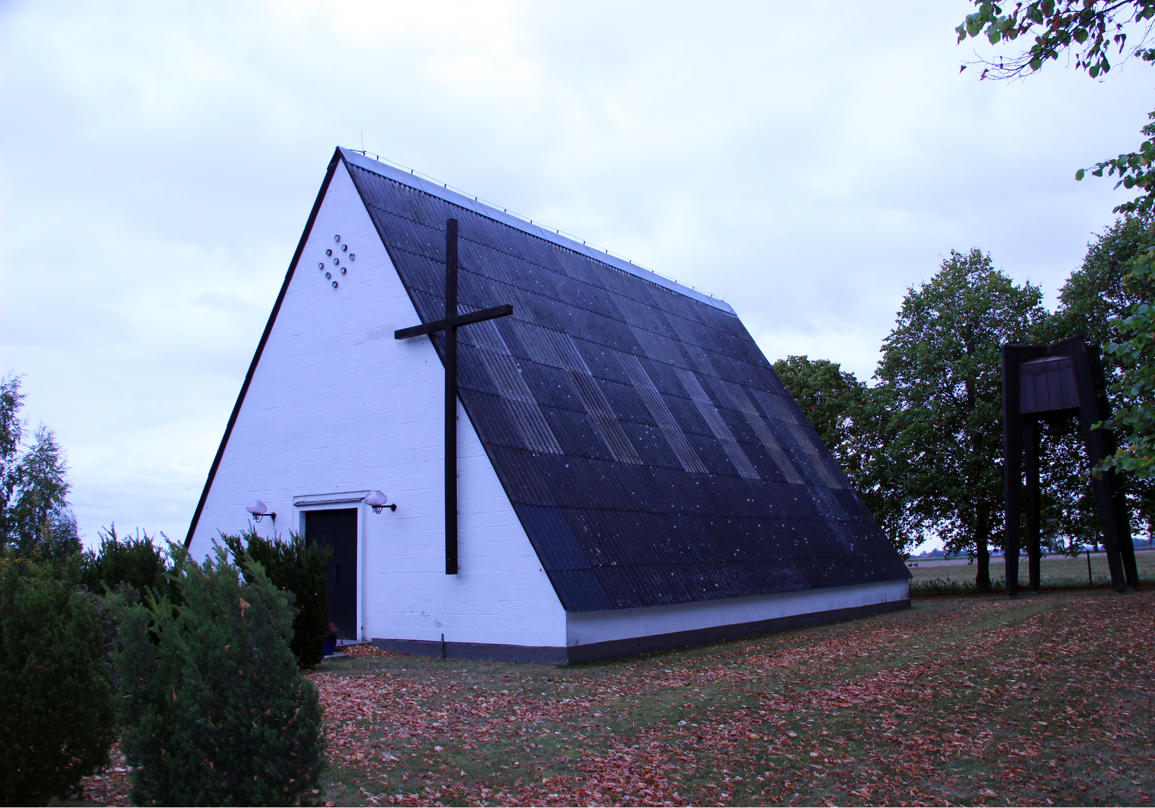 Hällums kyrka (Stora Halla 1:11)